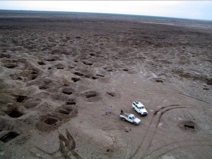 בורות ביזה והרס שבוצעו על ידי עיראקיים באתר הארכאולוגי של איסין בשנת 2003, הבורות הרסו את האתר לחלוטין והסבו לו נזק רב